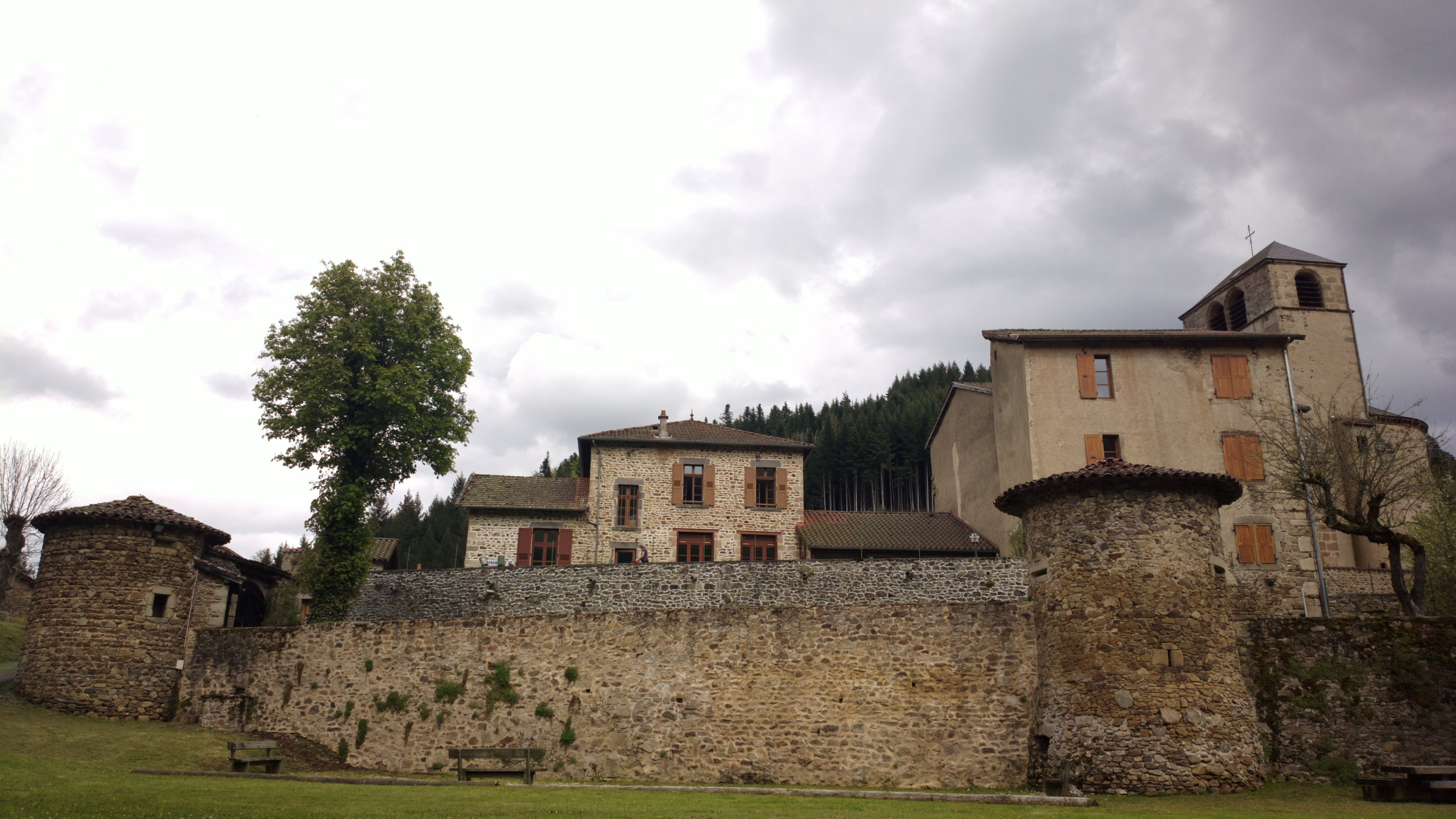 Saint-Vert est une commune française, située dans la région Auvergne et le département de la Haute-Loire.